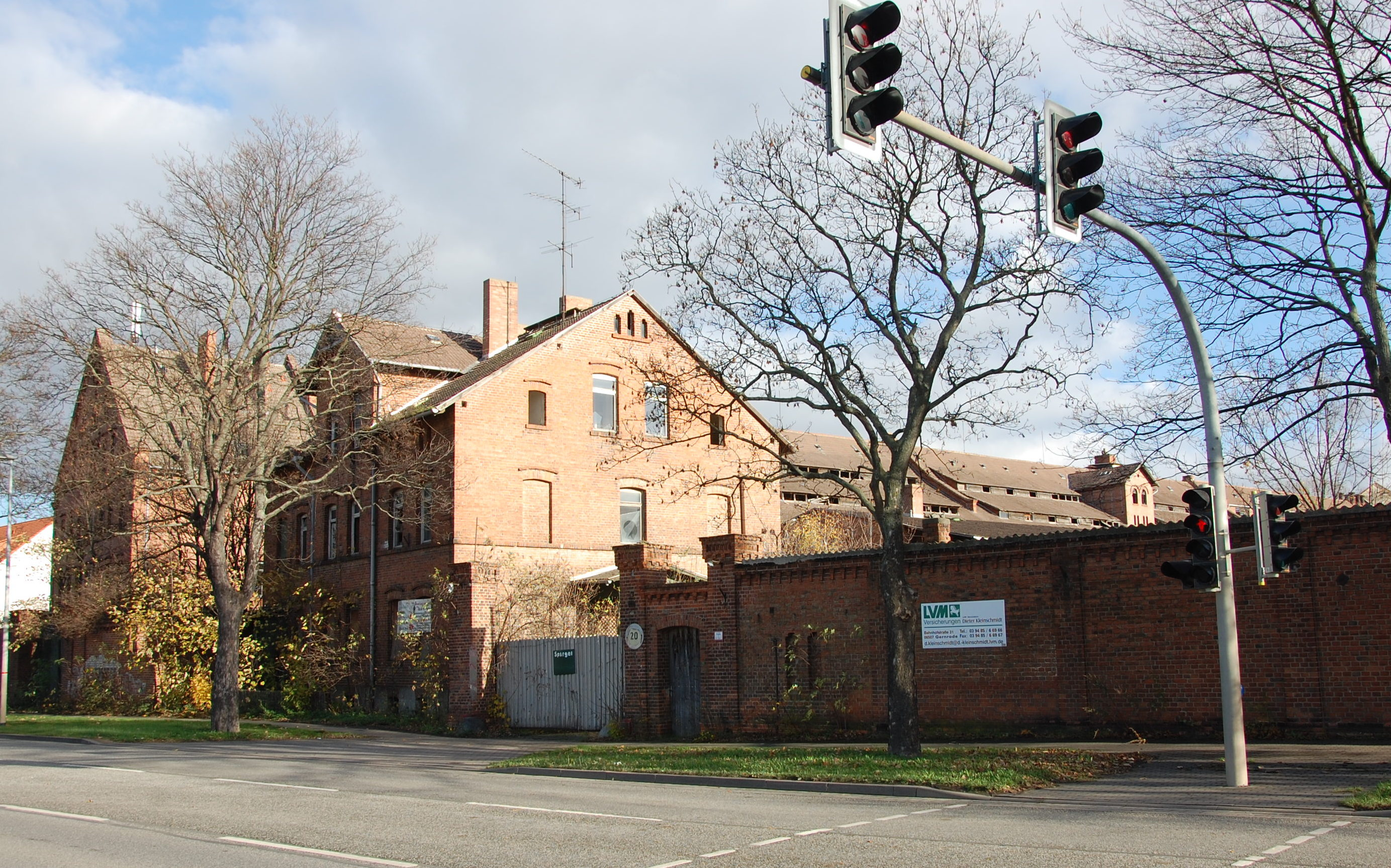 Gebäudekomplex Gernröder Straße (Quedlinburg)